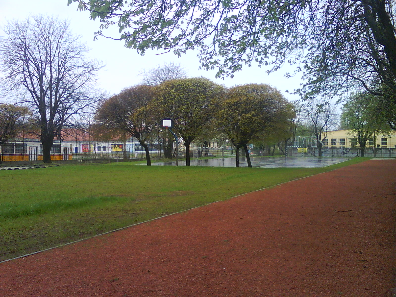 Giorgio Perlasca Szakközépiskola sportudvara (Kőbánya, Budapest X. ker.)